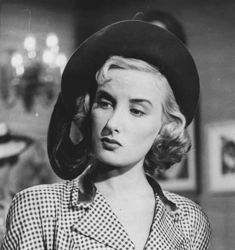 Fotografía blanco y negro sobre papel fotográfico brillante con borde inferior blanco. En primer plano Mirtha Legrand de frente, mirando hacia la izquierda. Película "La doctora quiere tangos".